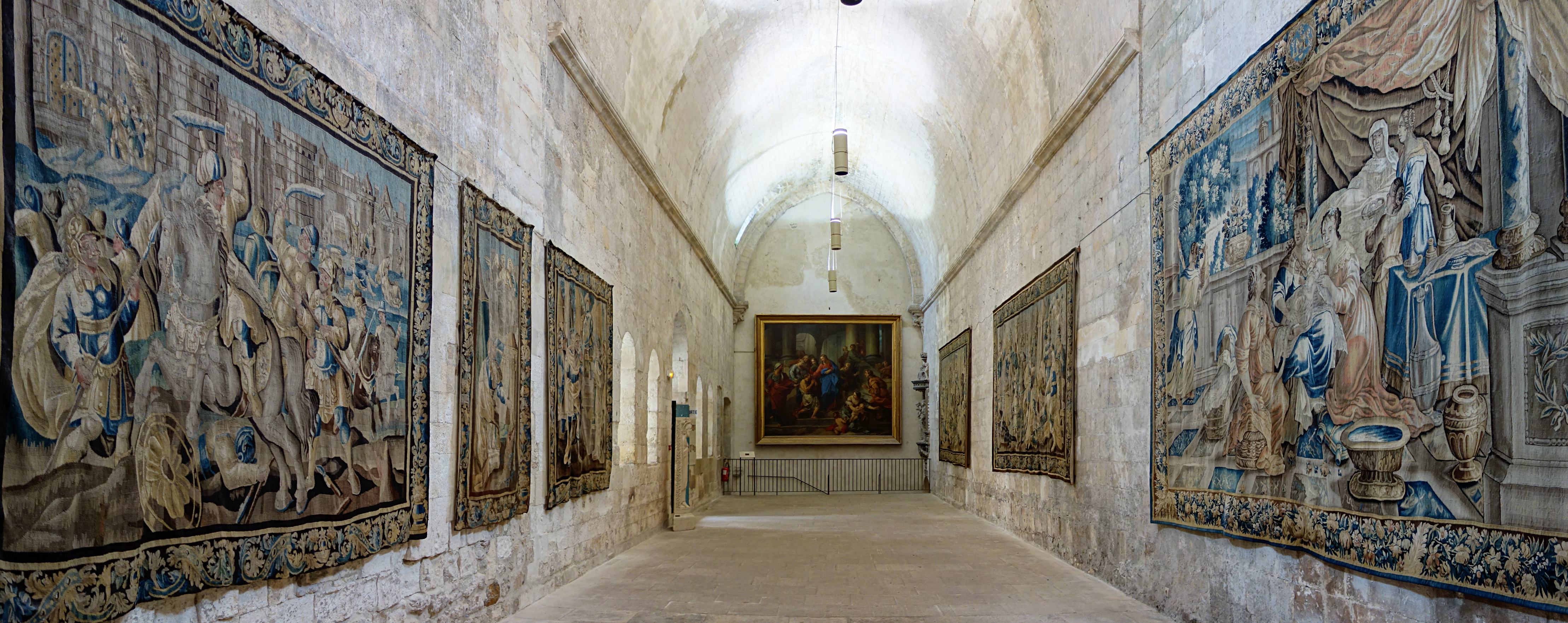 La salle des tapisseries dans le Cloitre de Saint-Trophime à Arles